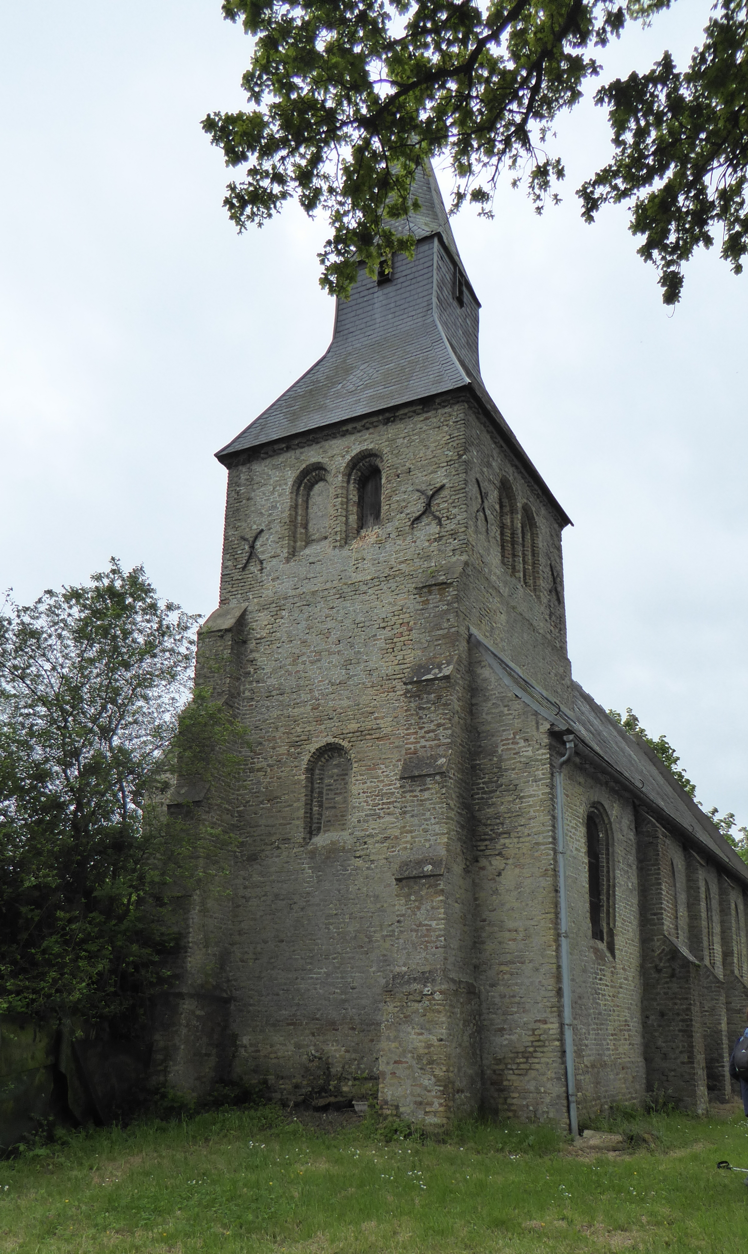 la chapelle ste-Mildred Millam Nord Hauts-de-France.